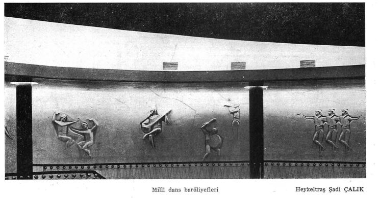 Konak Sineması fuayesinde Şadi Çalık'a ait milli dans rölyefleri